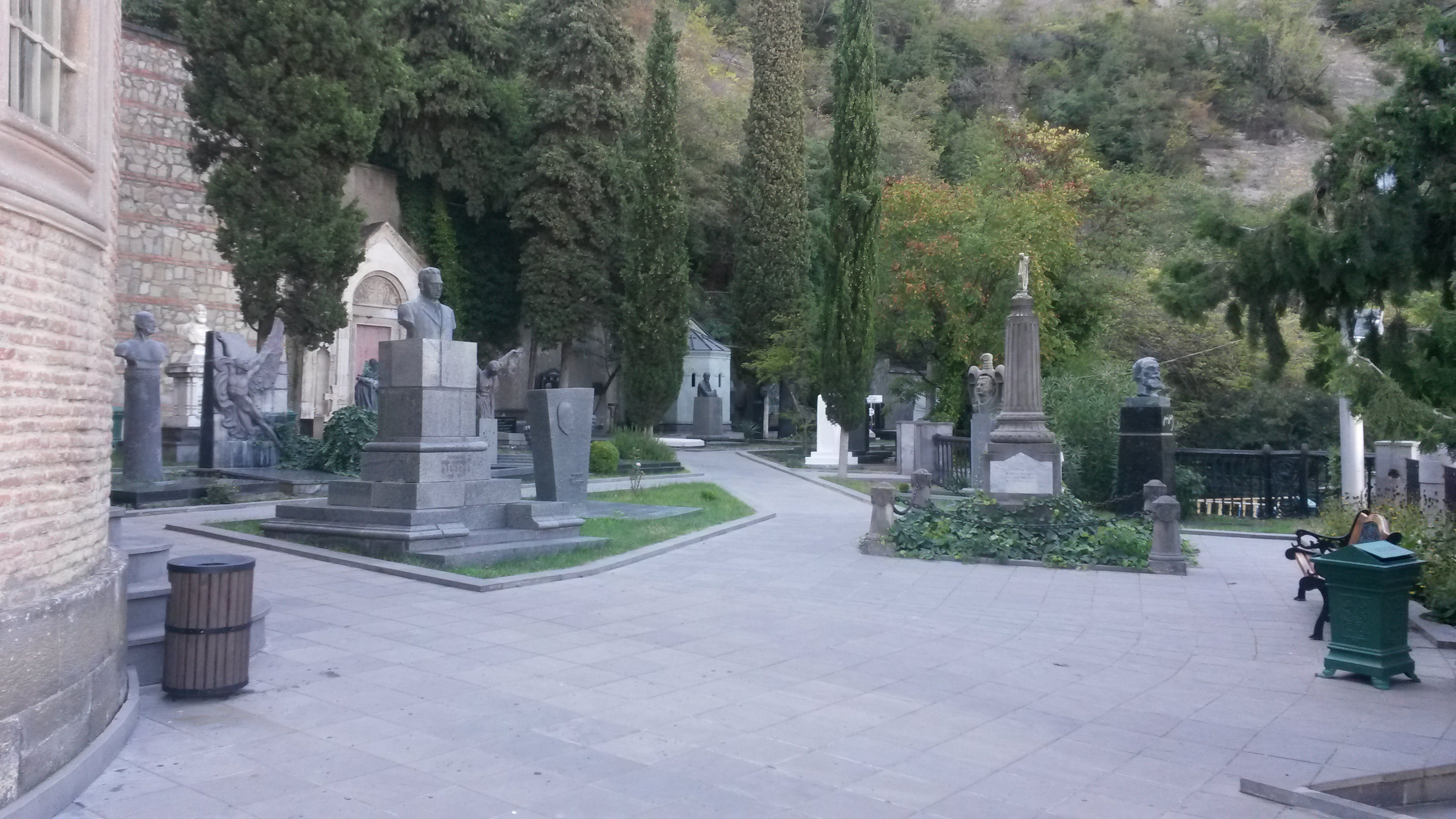 მთაწმინდის პანთეონი